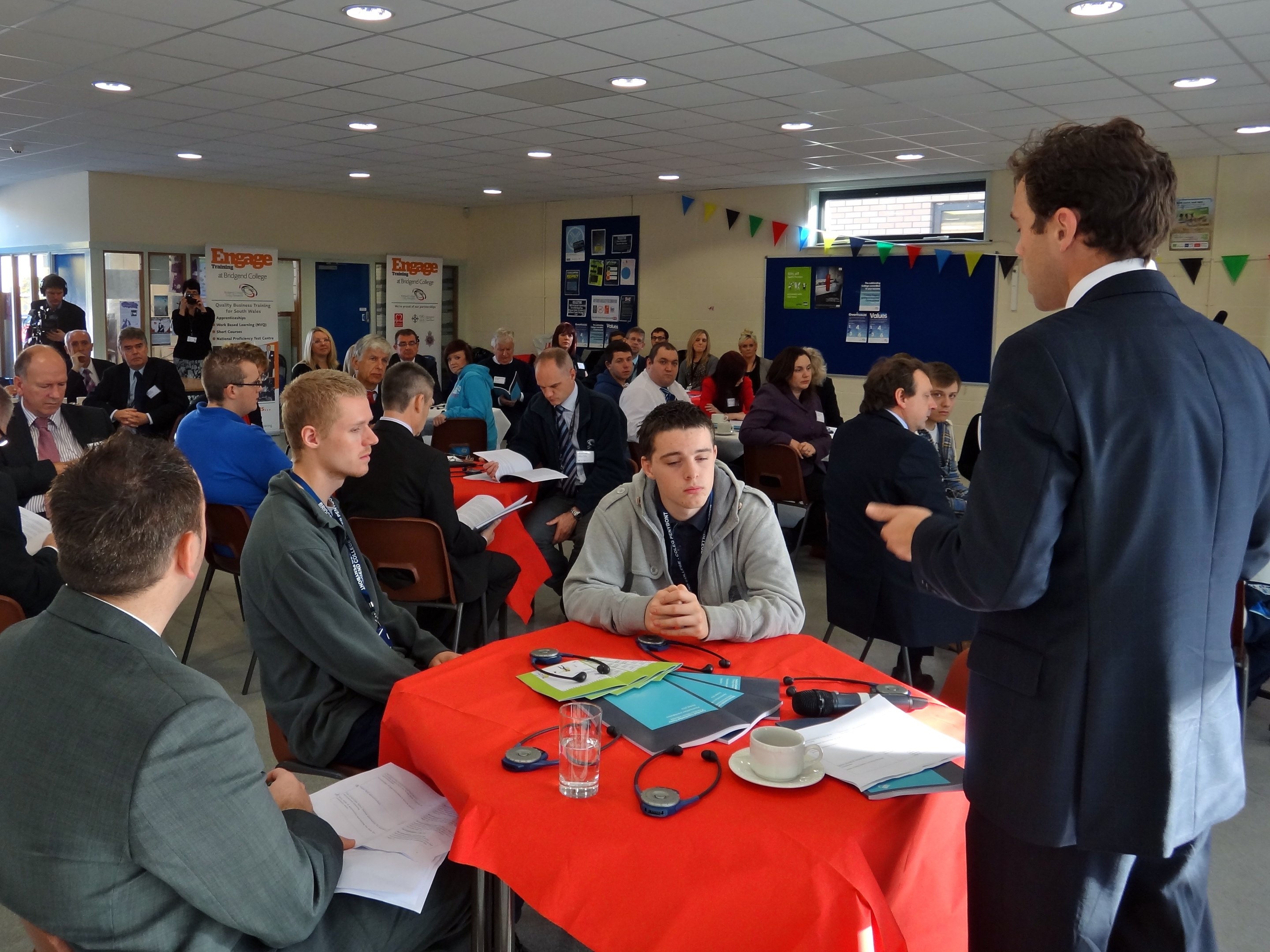 Apprenticeship report launch at Bridgend College / Lansiad adroddiad prentisiaethau yng Ngholeg Pen-y-bont